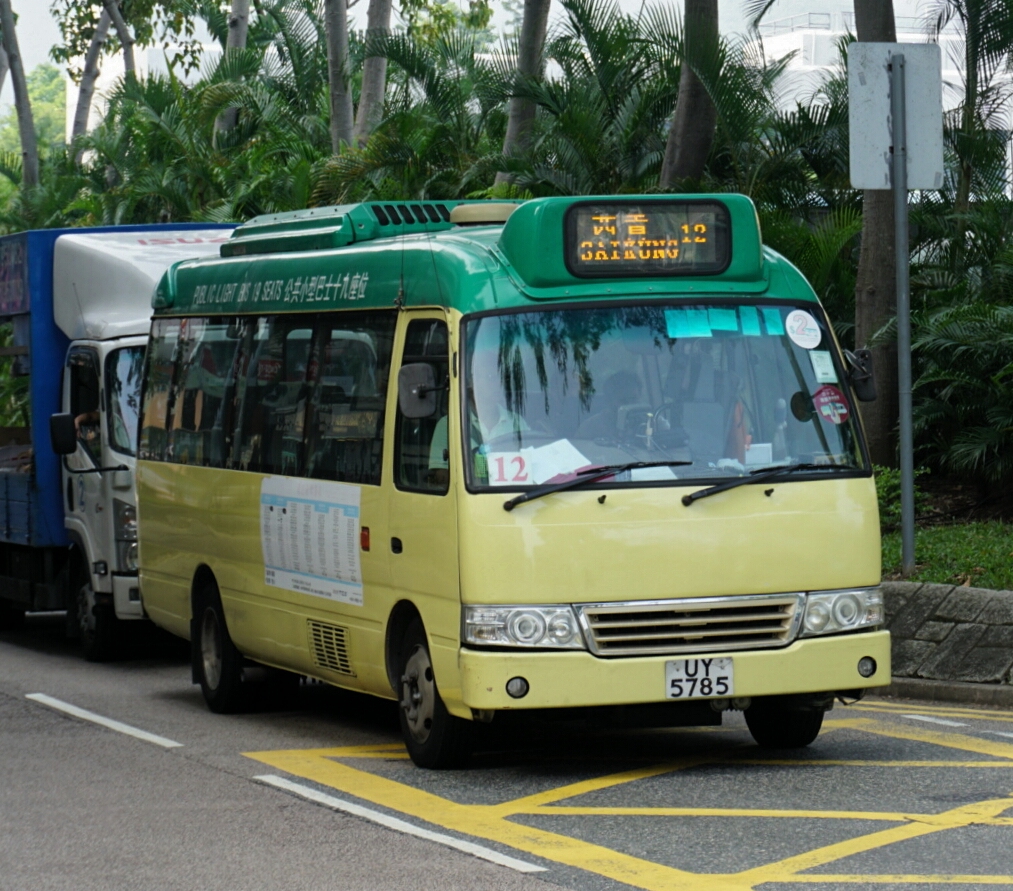 中文（香港）: 新界區專線小巴12線，正途經福民路前往西貢碼頭